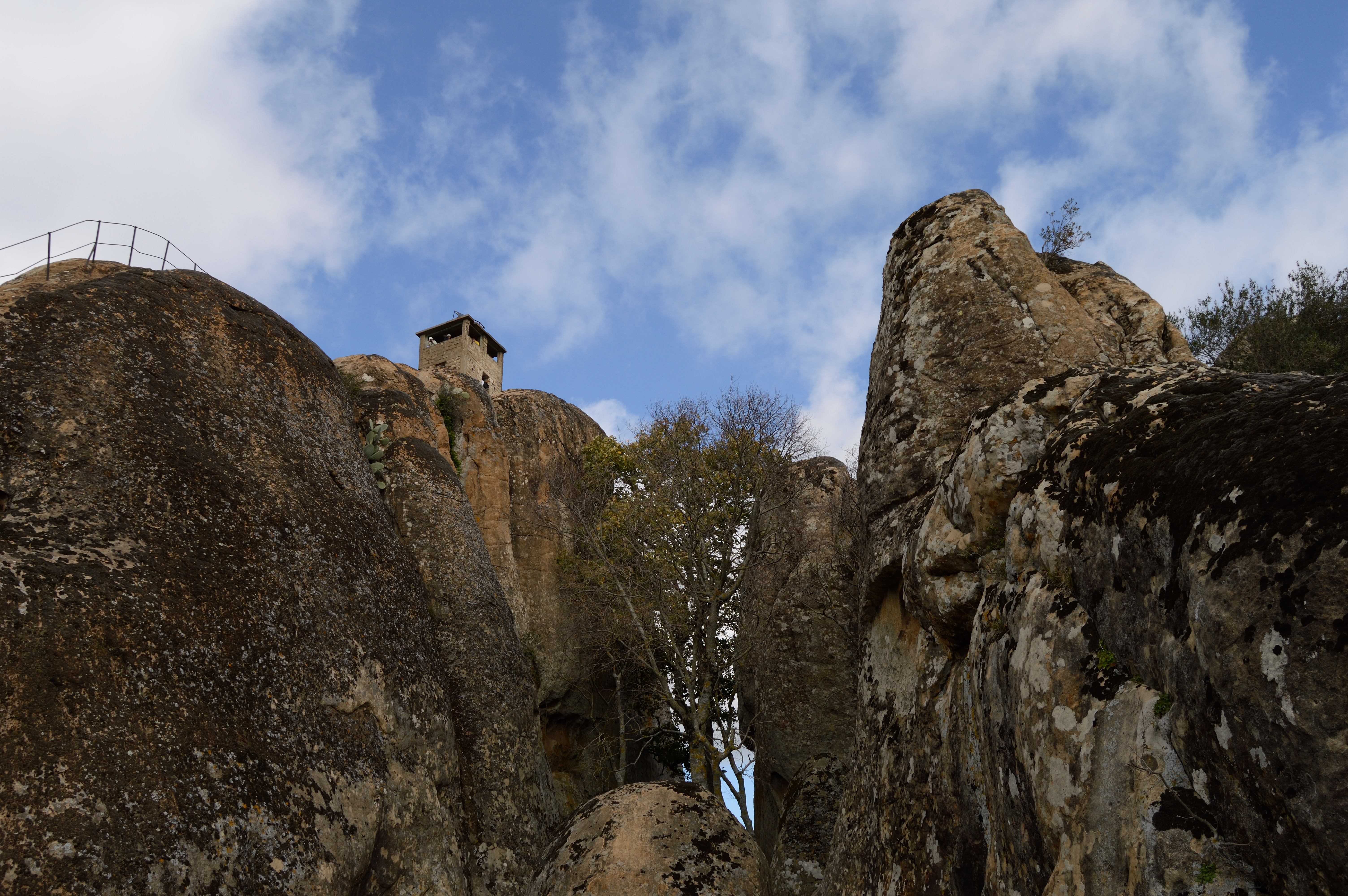 feija